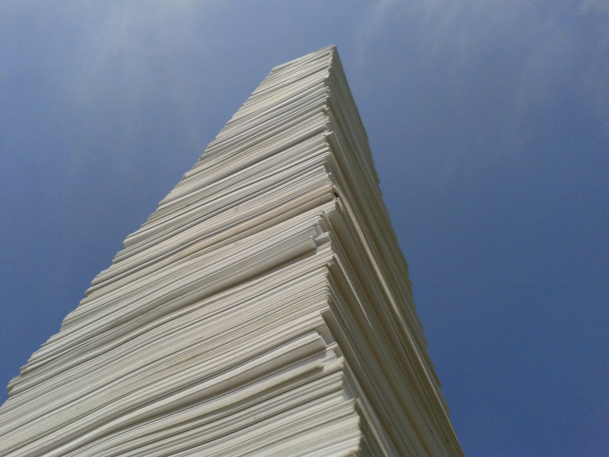 A4, instalace v Květné zahradě Kroměříž, papír A4, 230 cm, 2012